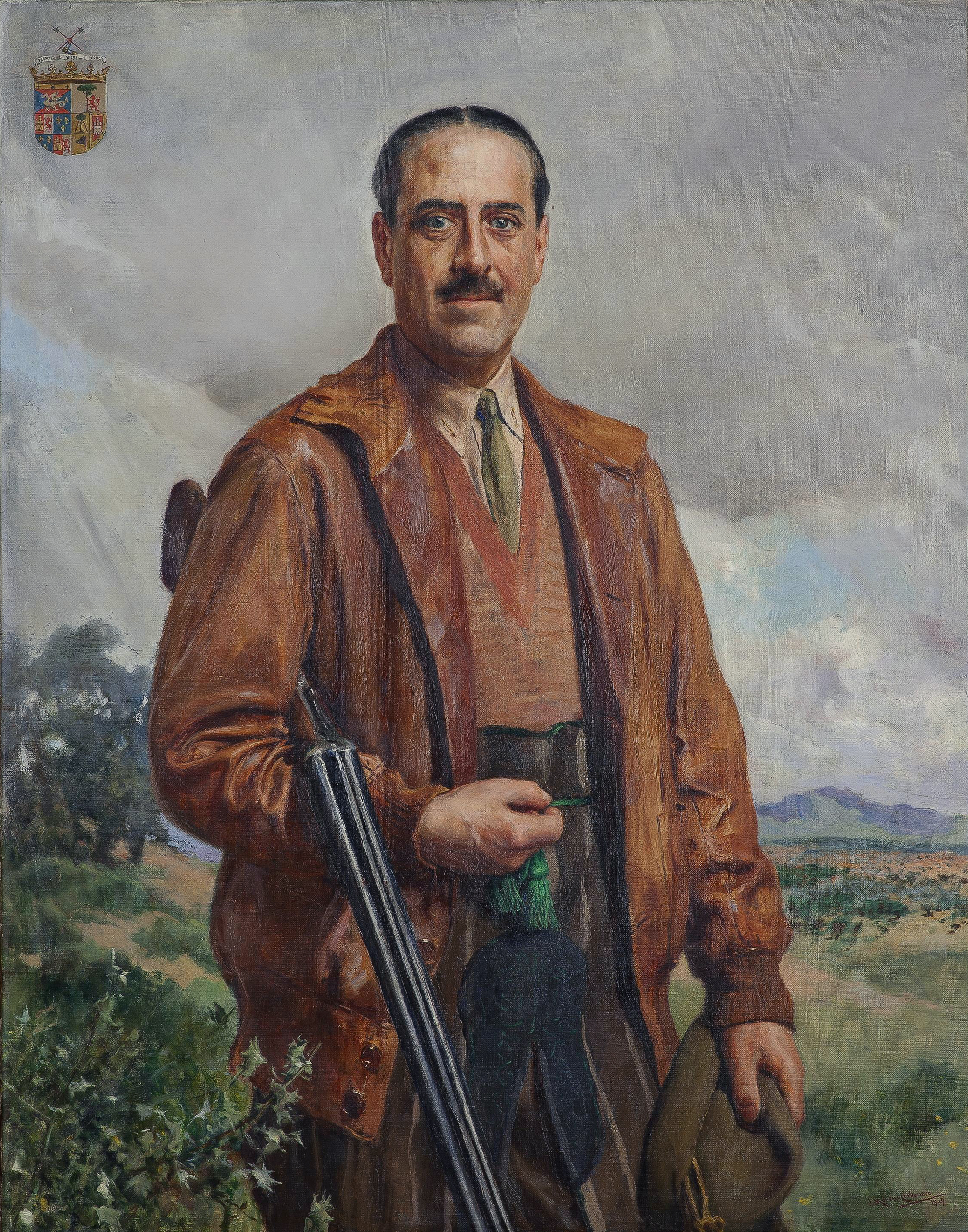 Retrato póstumo del aristócrata español Álvaro Drake y Travesedo de la Cerda y Fernández-Casariego (1883-1928), que fue marqués consorte de Villablanca por su matrimonio con la marquesa Ángela de Losada y González de Villalaz, VII marquesa de Villablanca.